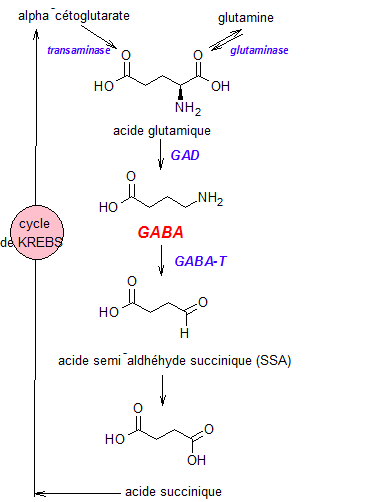 métabolisme du GABA